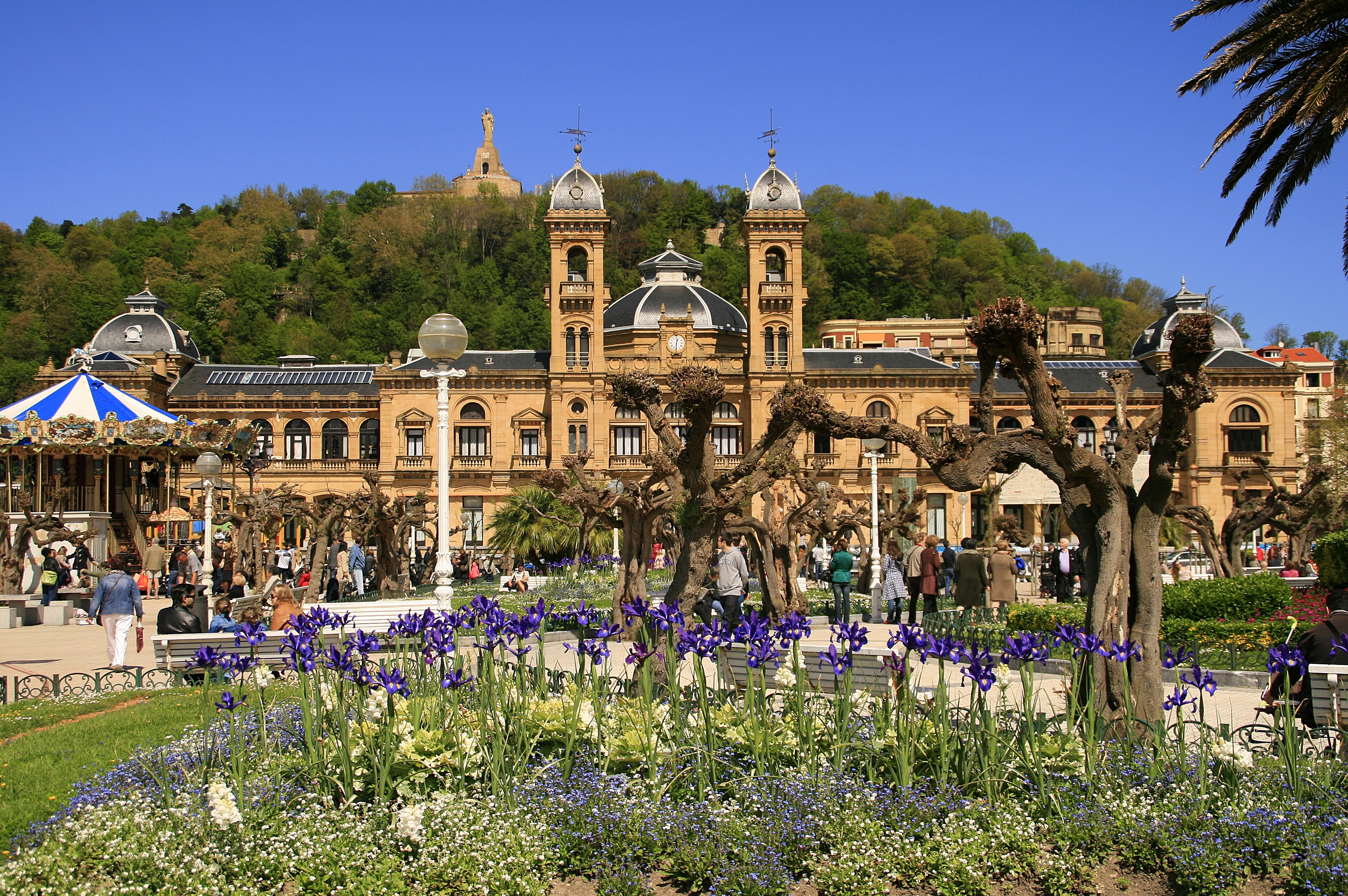 San Sebastián - Donostia.